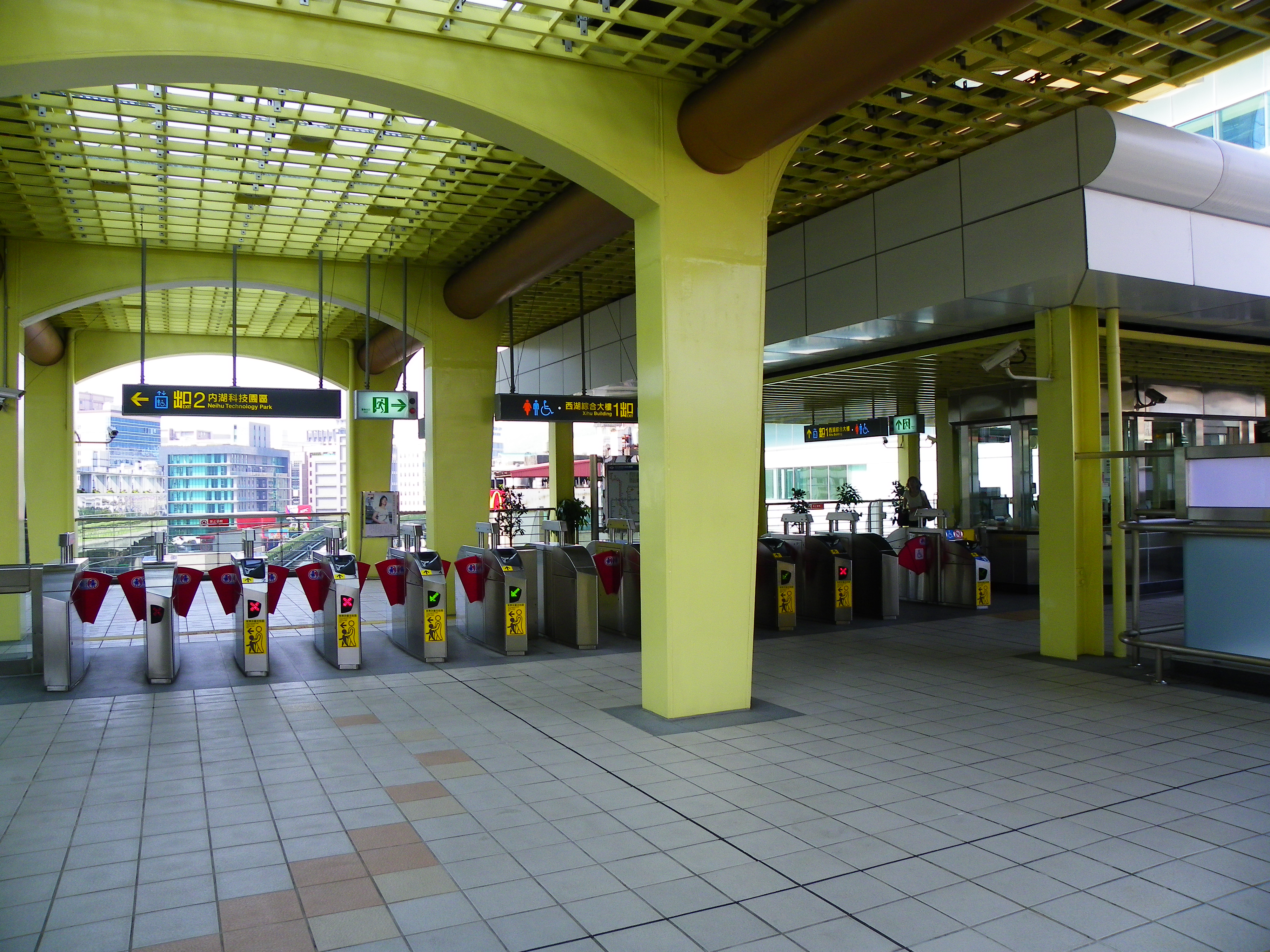 台北捷運内湖線西湖駅の北改札口。